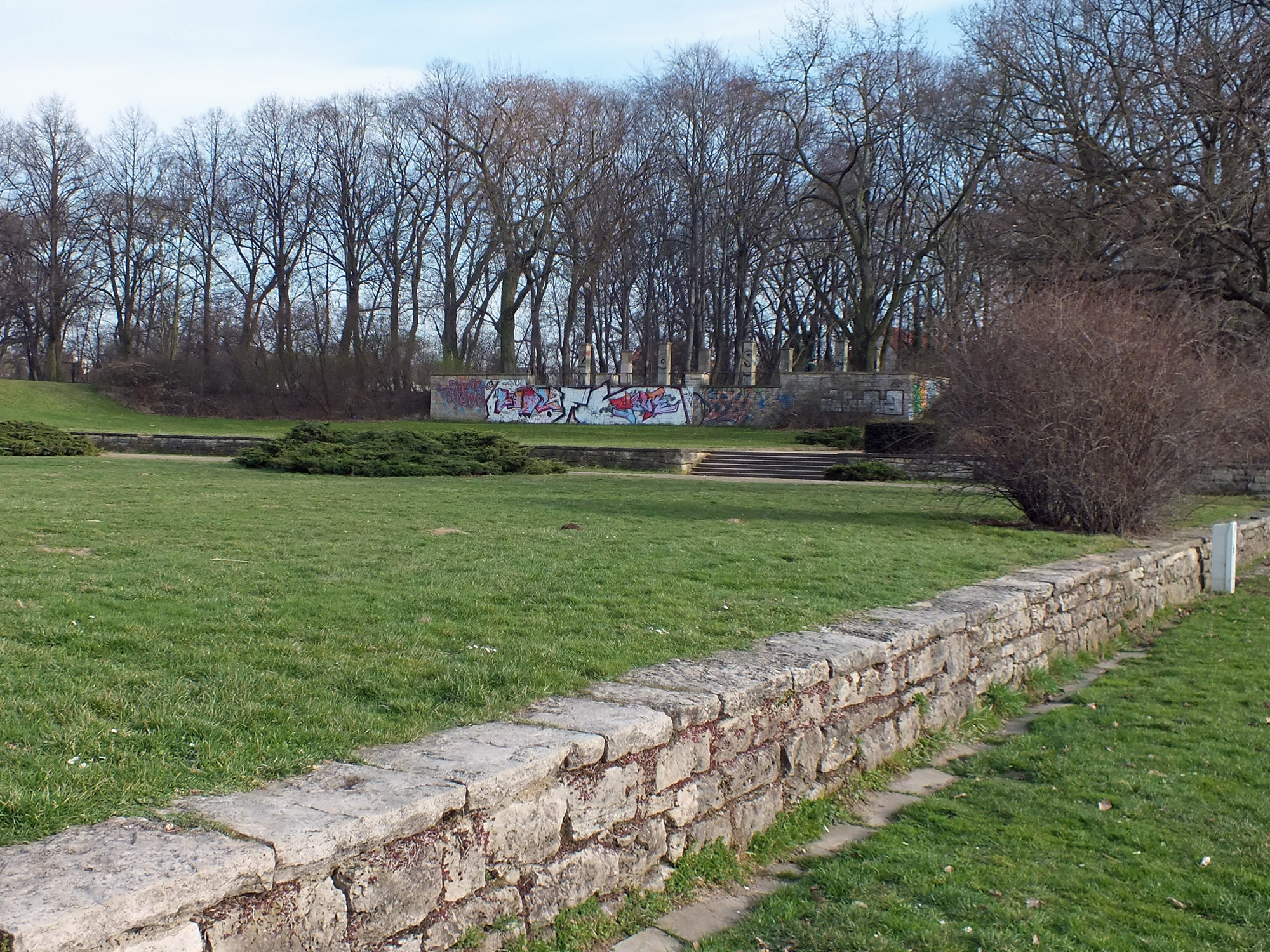 Der Richard-Wagner-Hain in Leipzig, Ostteil mit Trockenmauer und ehemaliger Blumenhalle